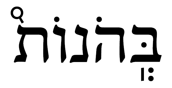 an example of shwa-ga'ja